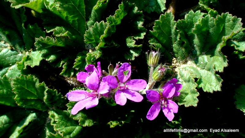 نباتات برّية سورية تؤكل